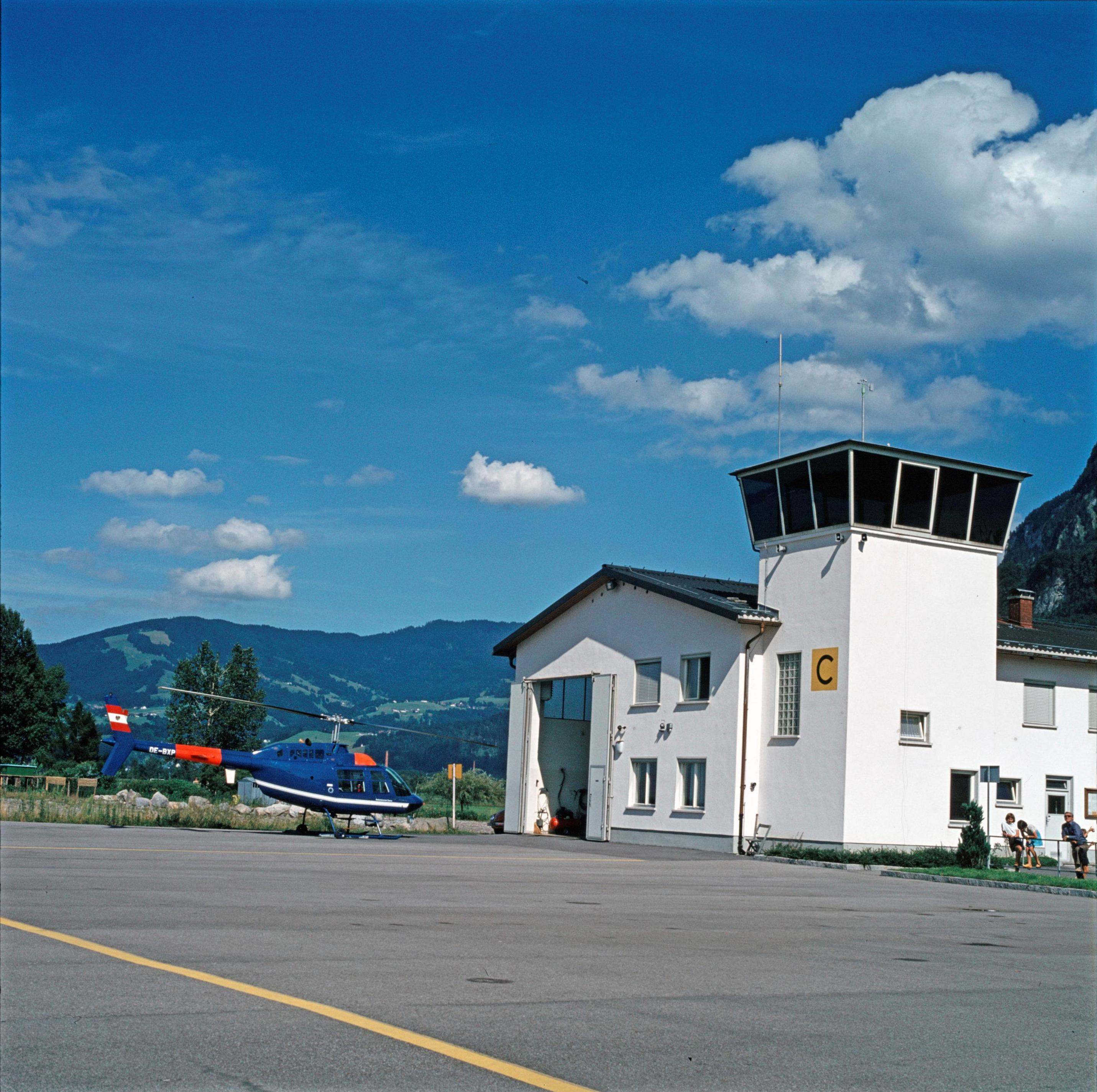 Ein hier stationierter Helikopter des österreichischen Innenministeriums (Flugpolizei) am Flugplatz Hohenems-Dornbirn im österreichischen Bundesland Vorarlberg. Aufnahme aus dem Jahr 1974 mit altem Gebäudebestand.